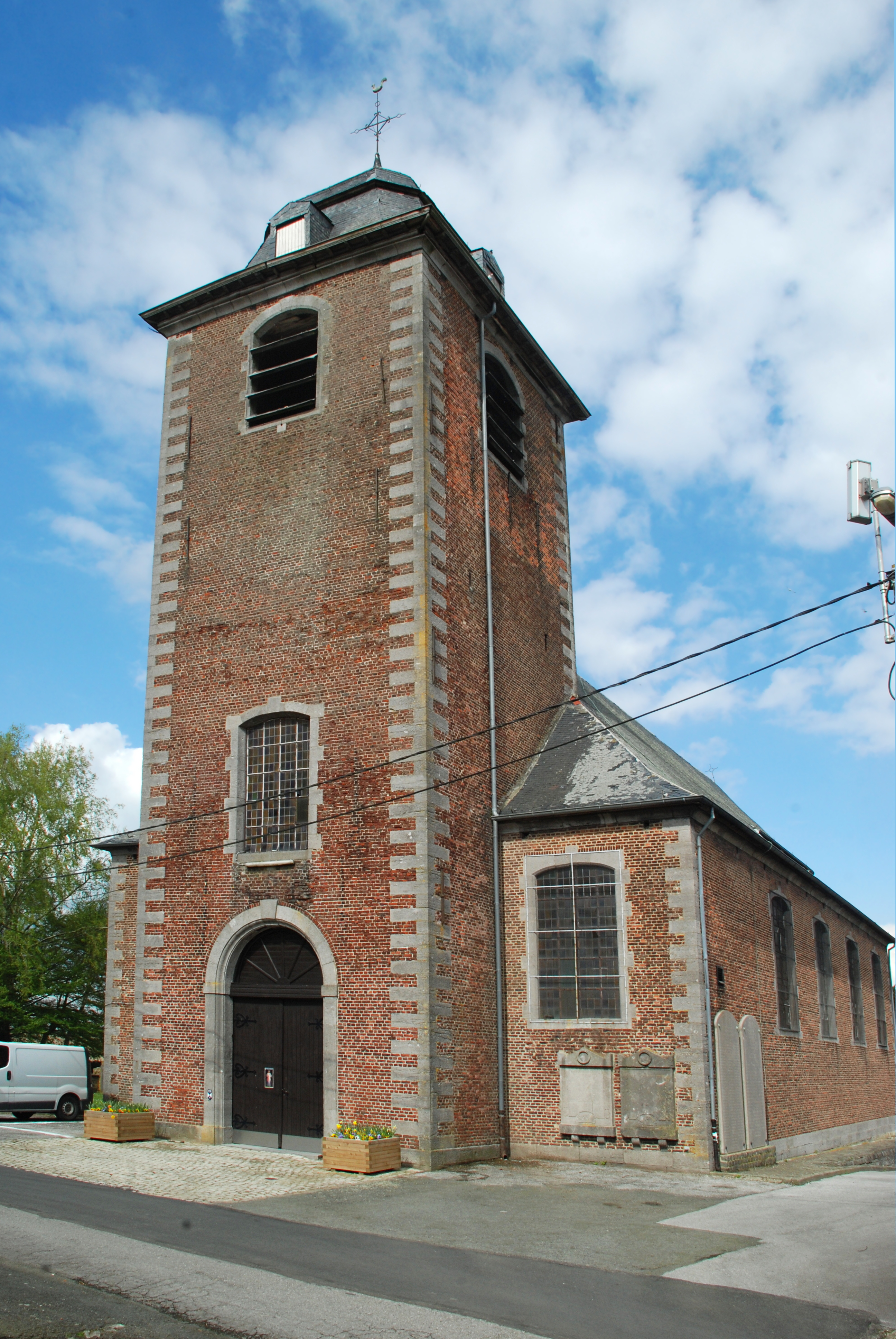 Belgique - Brabant wallon - Genappe - Baisy-Thy - Église Saint-Hubert